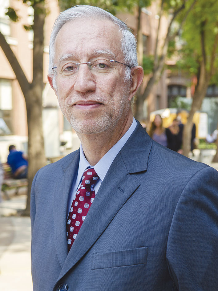 Foto del Profesor Alejandro Vergara Blanco